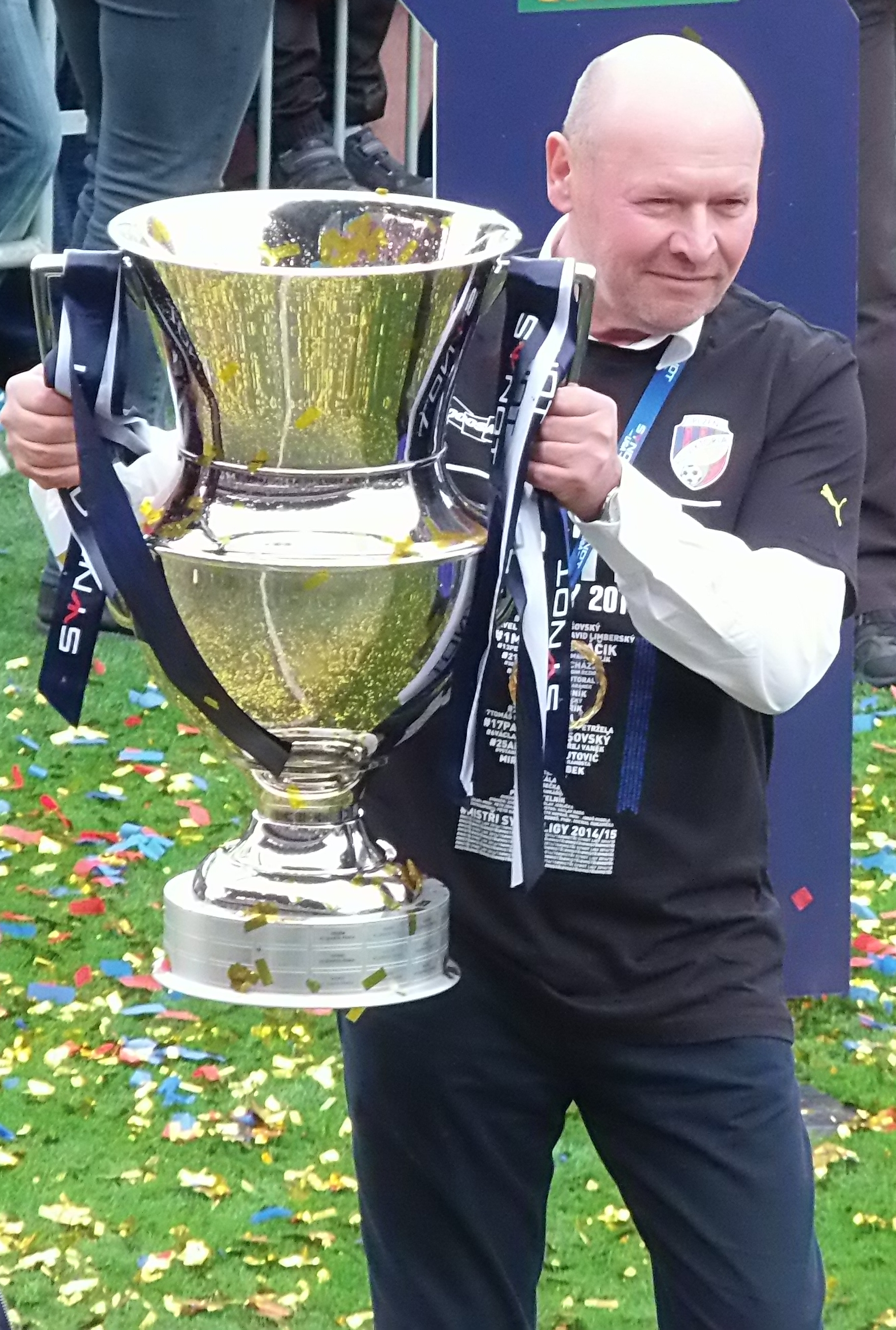 FC Viktoria Plzeň - oslavy titulu v české lize, květen 2015 - 05